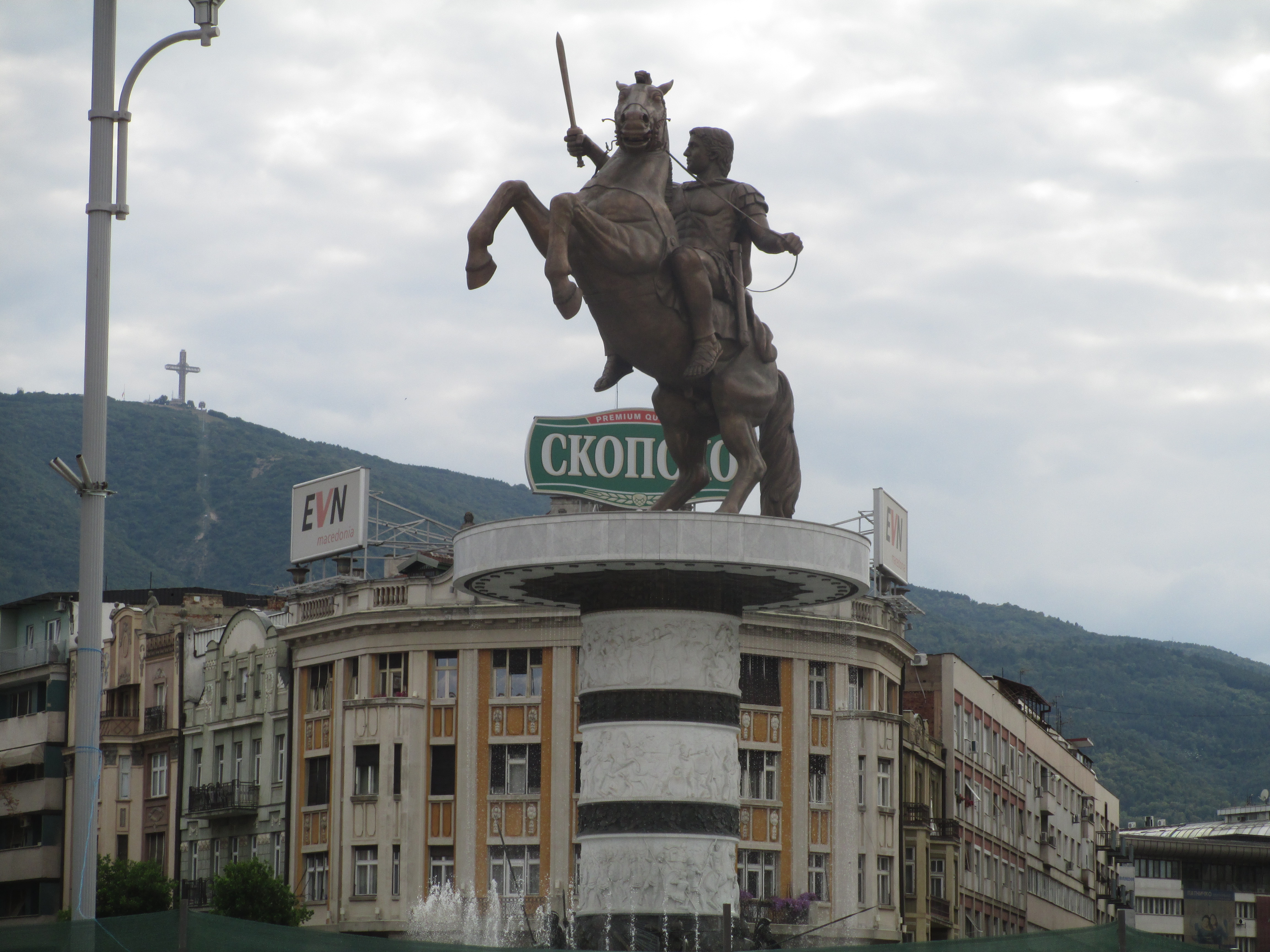 פסל אלכסנדר הגדול בסקופיה